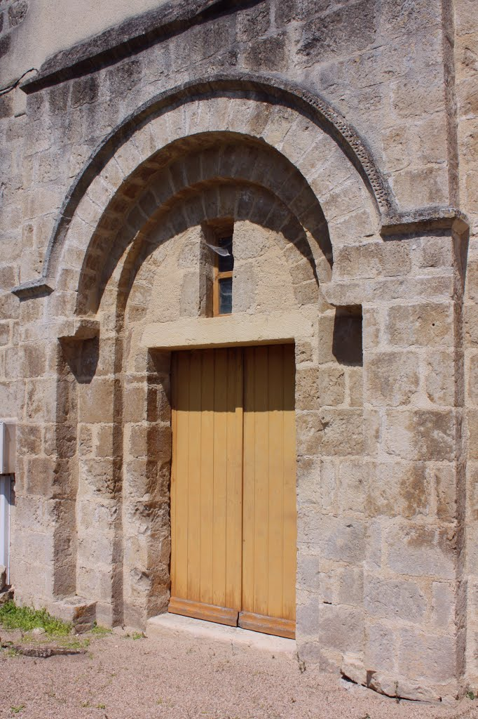 Bouzais - Eglise Saint-Roch Portail Ouest